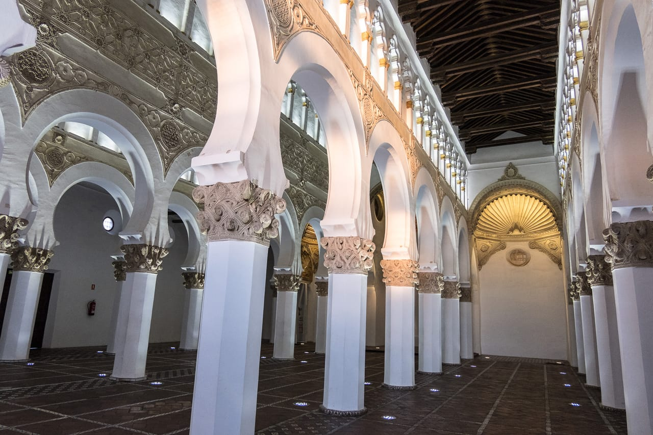 Old synagogue, Toledo